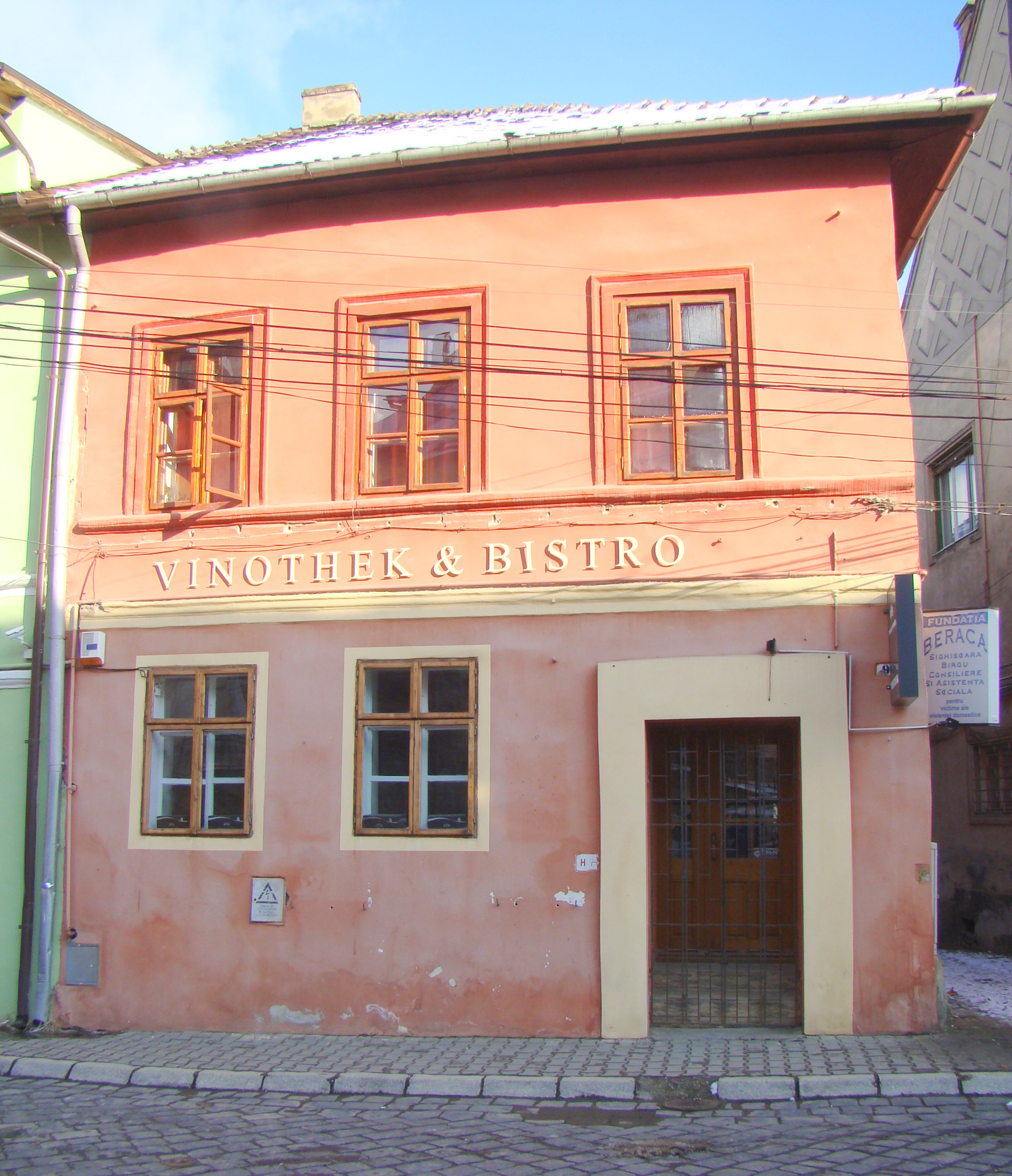 Fostul restaurant „Heimat”, municipiul Sighișoara, Piața Oberth Hermann 9 1700 - 1775, 1800 - 1825